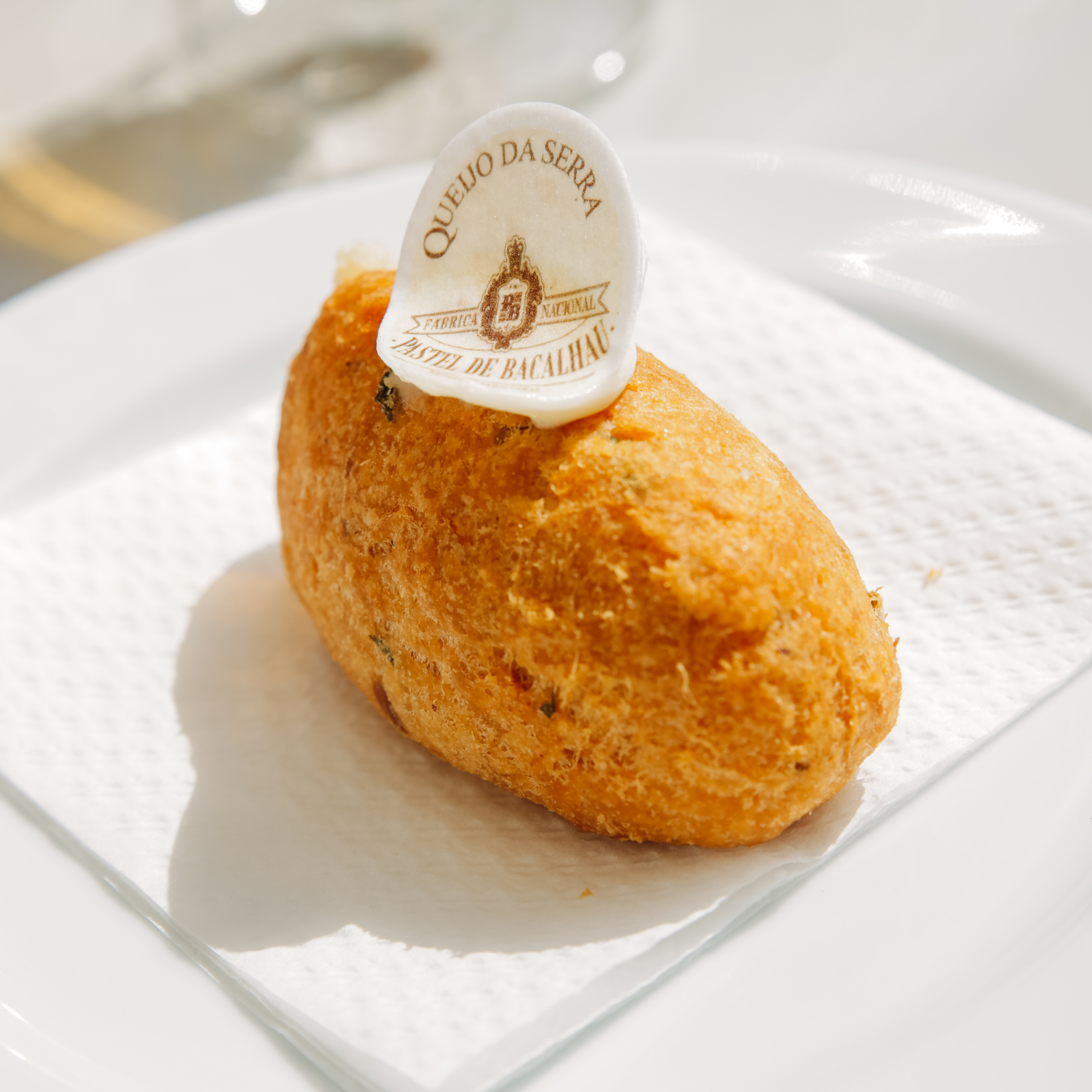 Lisbon 14